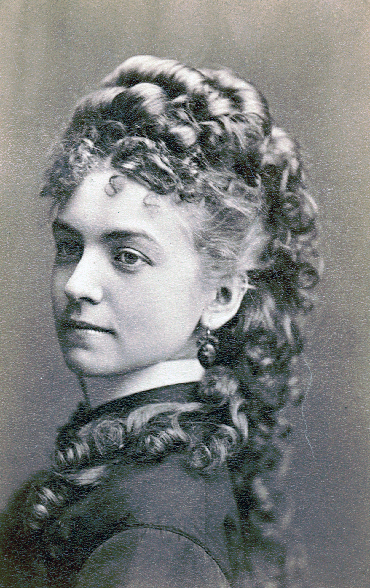 Selma Lindqvist, skådespelare vid Kungliga Dramatiska teatern 1871